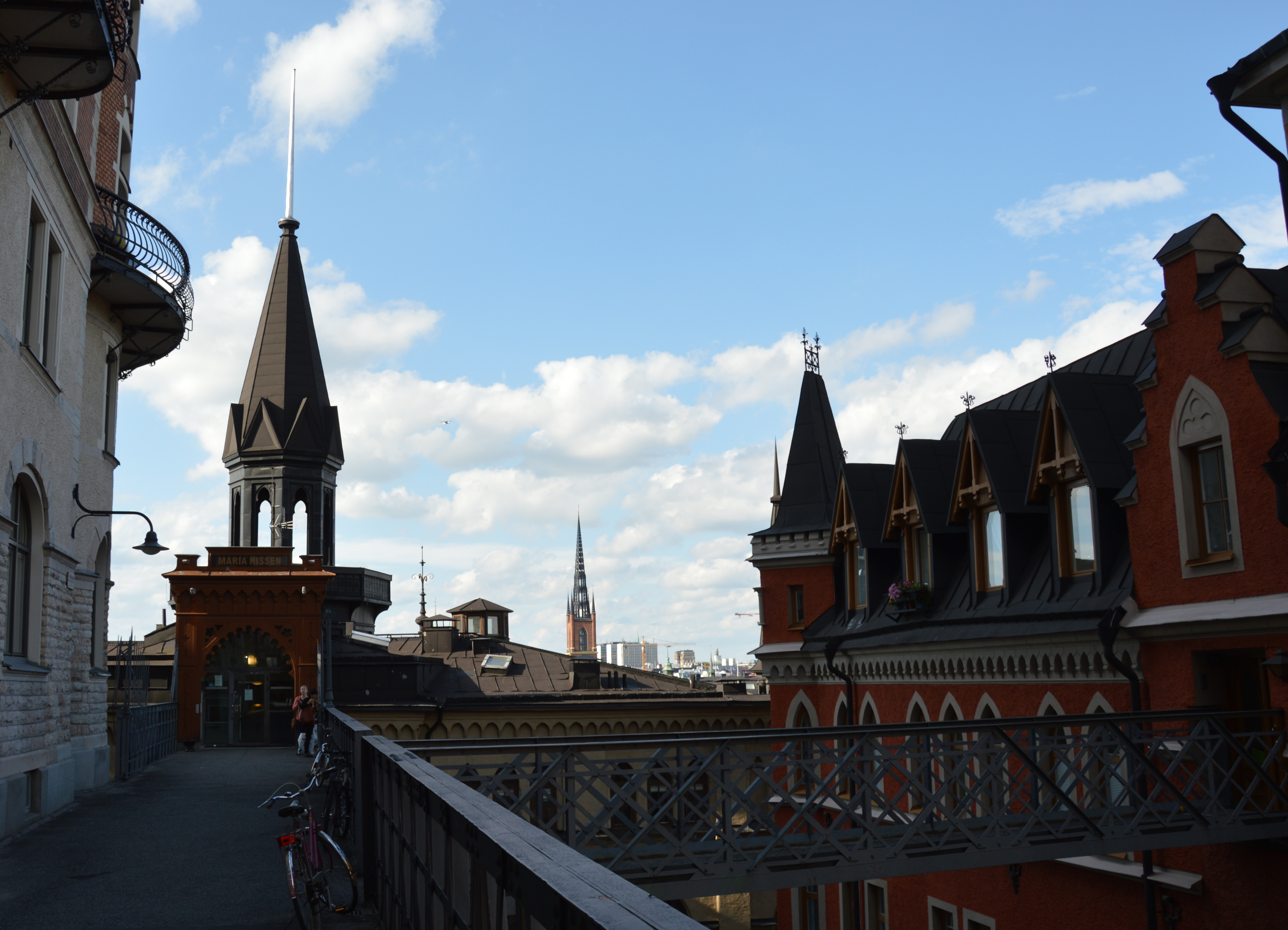 Maria Hissen Stockholm